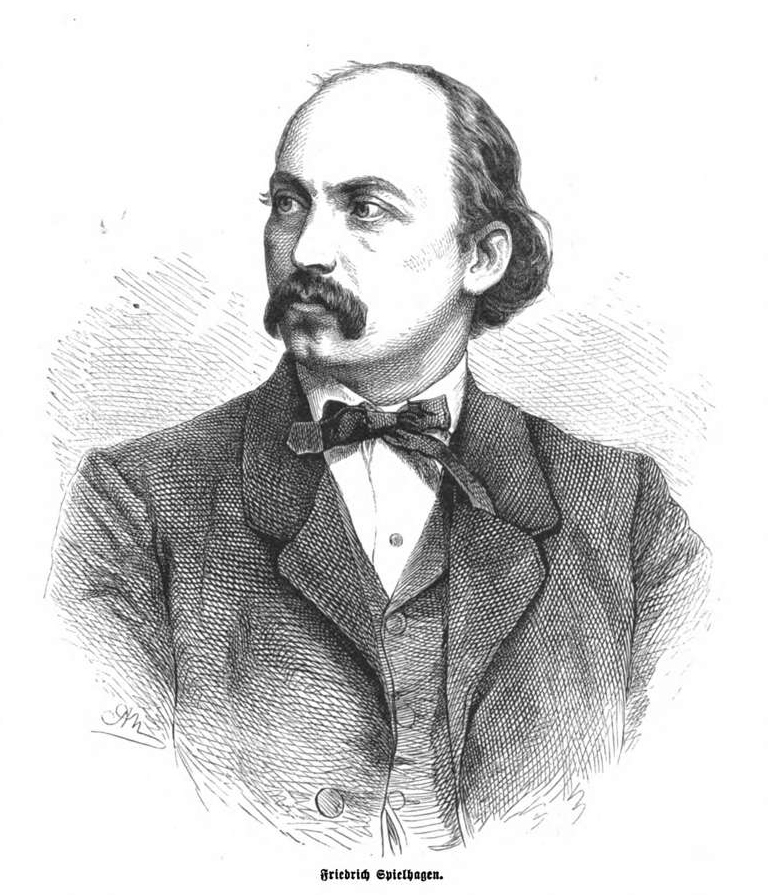 Friedrich Spielhagen, deutscher Schriftsteller im 19. Jh.